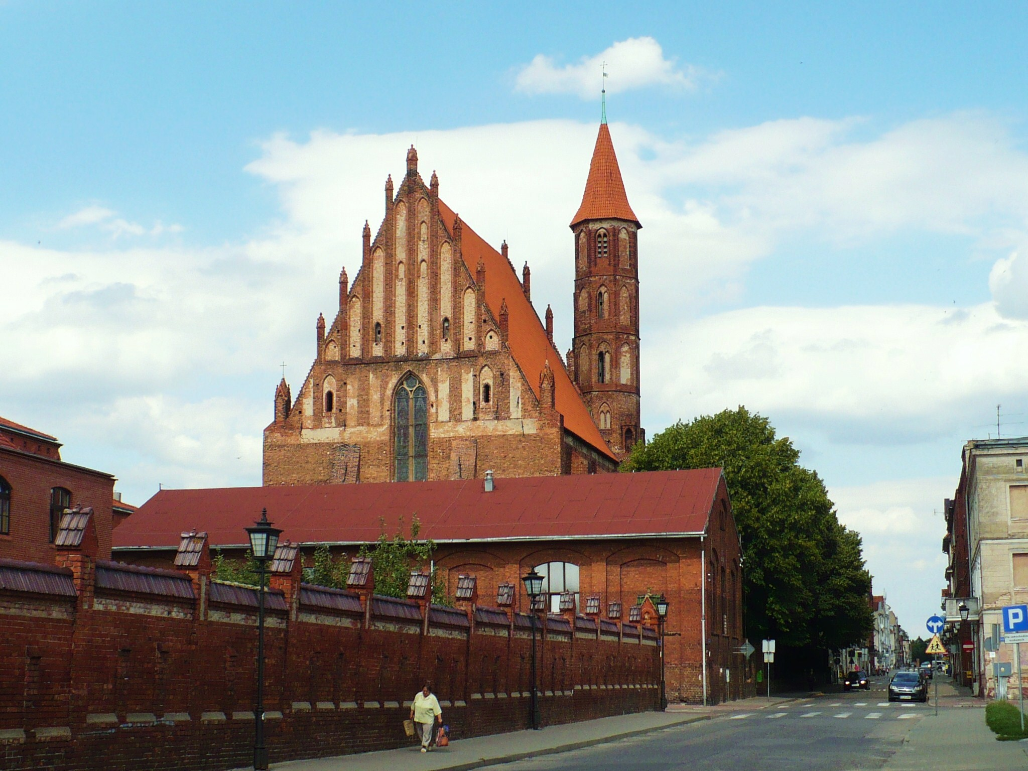 kościół franciszkanów, ob. fil. pw. śś. Jakuba i Mikołaja, XIII/XIV Chełmno, ul. Biskupia